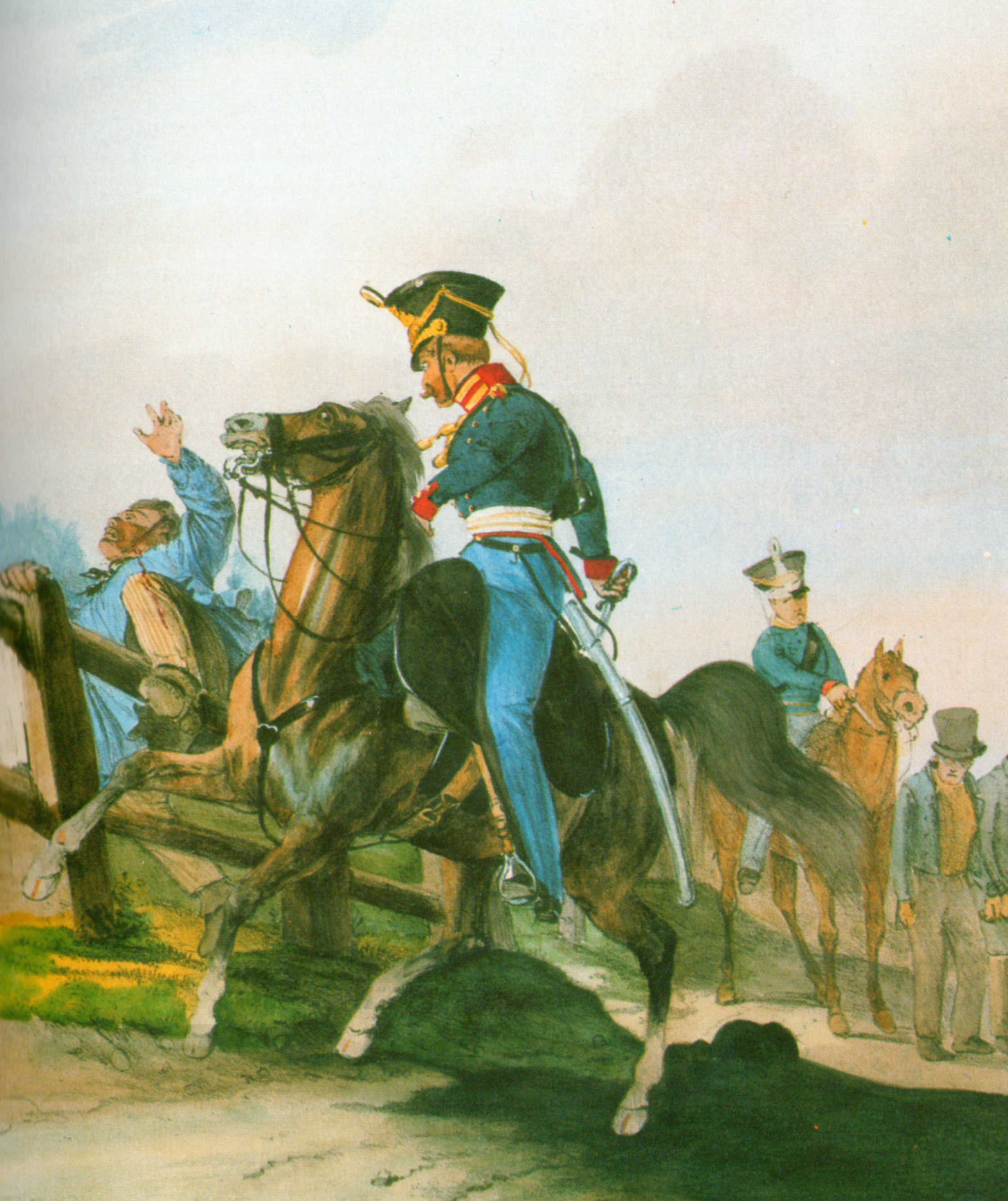 Gendarm zu Pferd der Königlich hannoverschen Landgendarmerie, ca. 1840, 1815 gegründet als Königlich hannoversches Landdragonerkorps. Uniform nach Art der hannoverschen Artillerie.